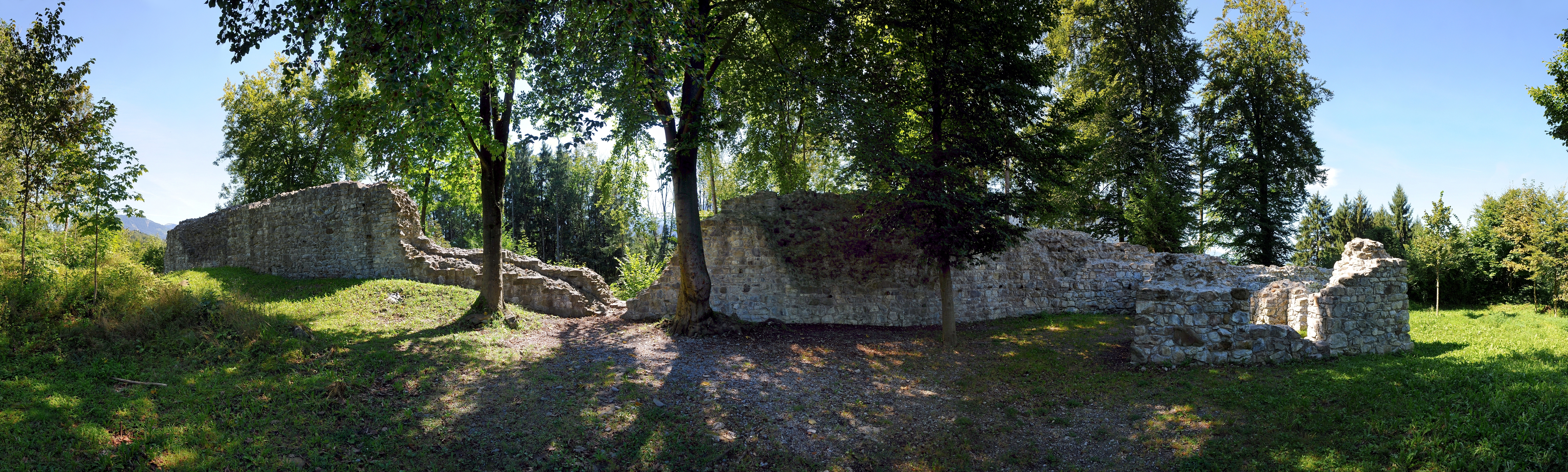 Burgruine Sigberg in Göfis. Info Das Objekt steht unter Denkmalschutz.